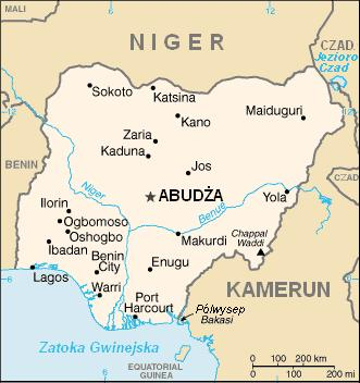 Mapa Nigerii, polska wersja mapy z CIA World Factbook